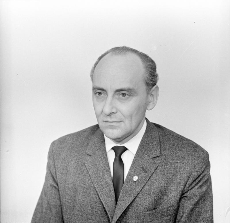 Zentralbild/Hochneder 11.7.1967 Horst Schumann Mitglied des Staatsrates, Mitglied des ZK der SED